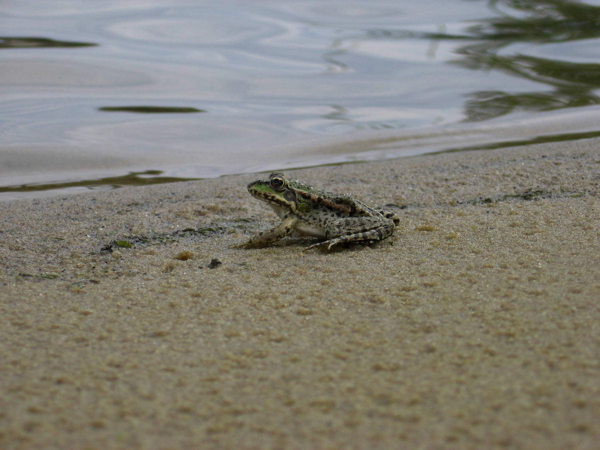 Новохопёрский район Воронежской области. Хоперский государственный заповедник. Река Хопёр. Живая природа.